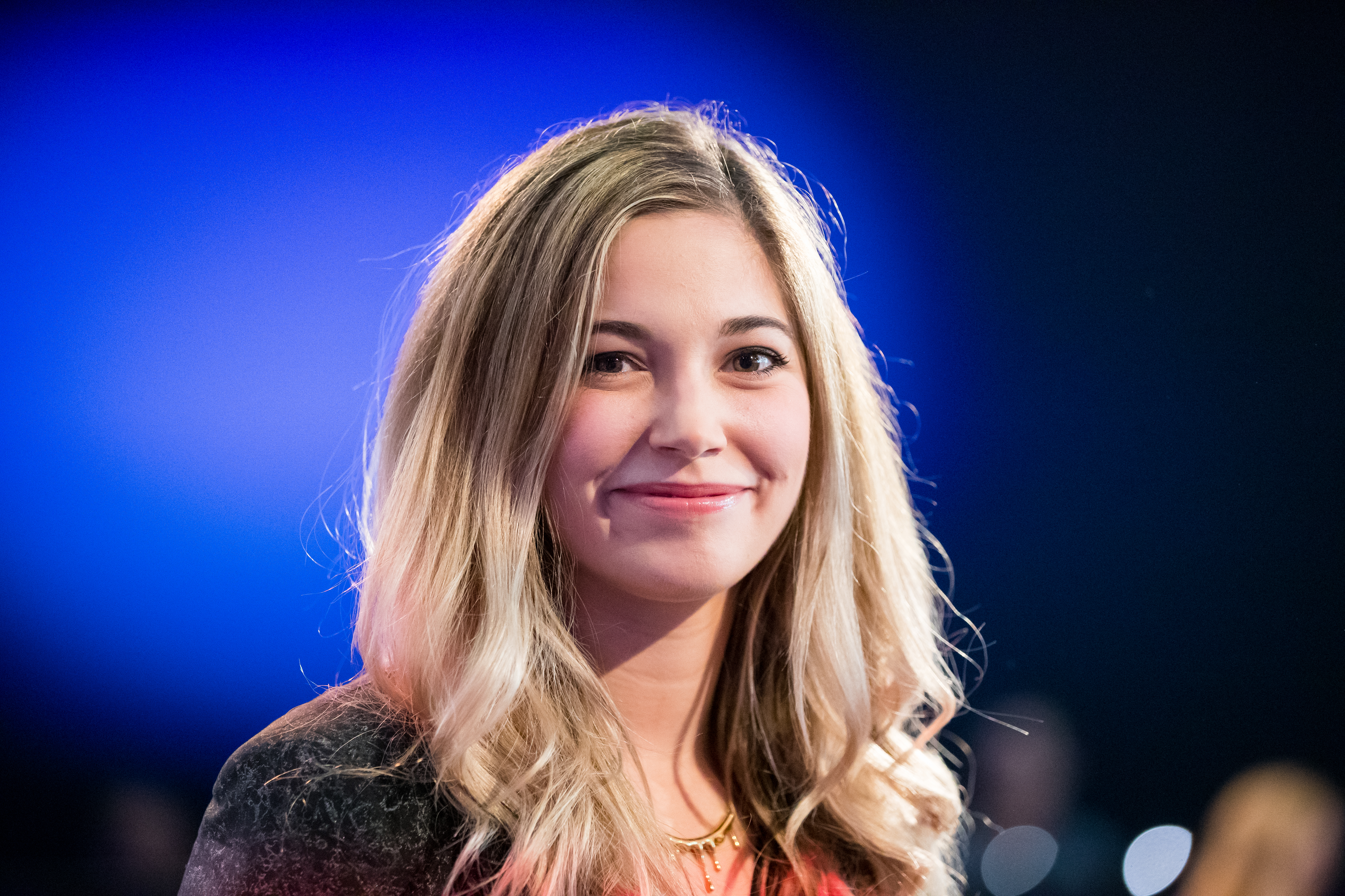 Julia Shaw during Frankfurter Buchmesse at Messe Frankfurt, Frankfurt, Hessen, Germany on 2018-10-13, Photo